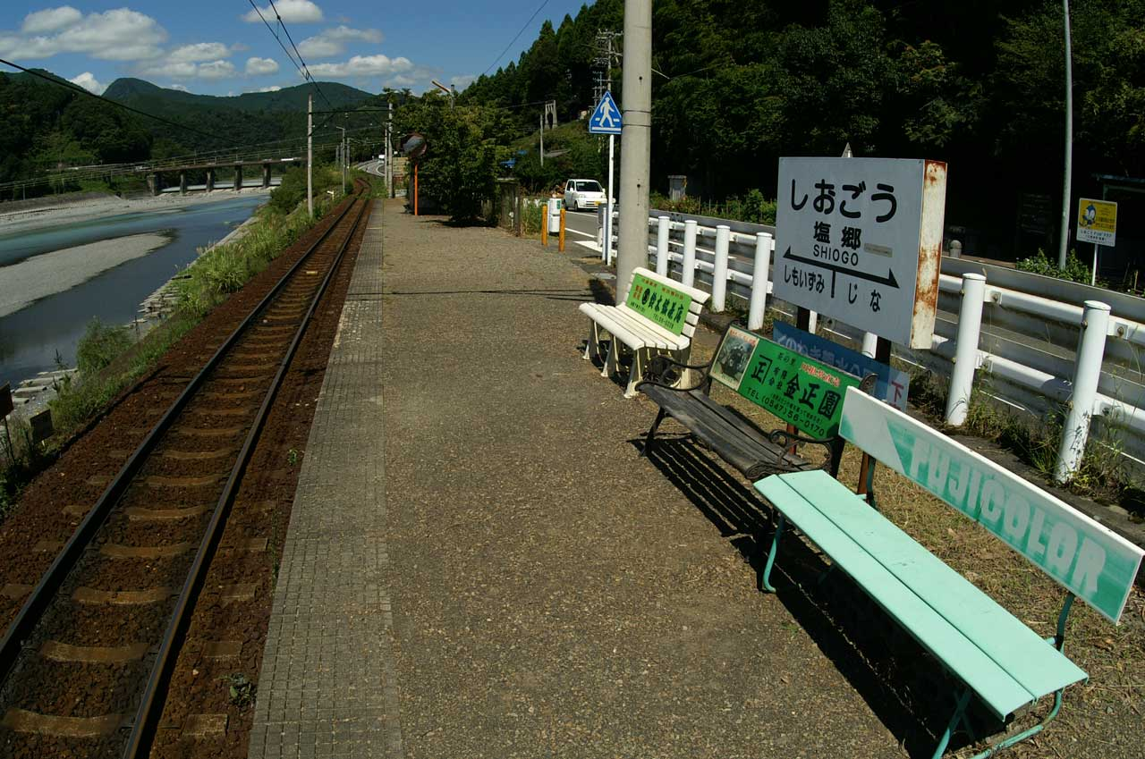 大井川鐵道大井川本線塩郷駅